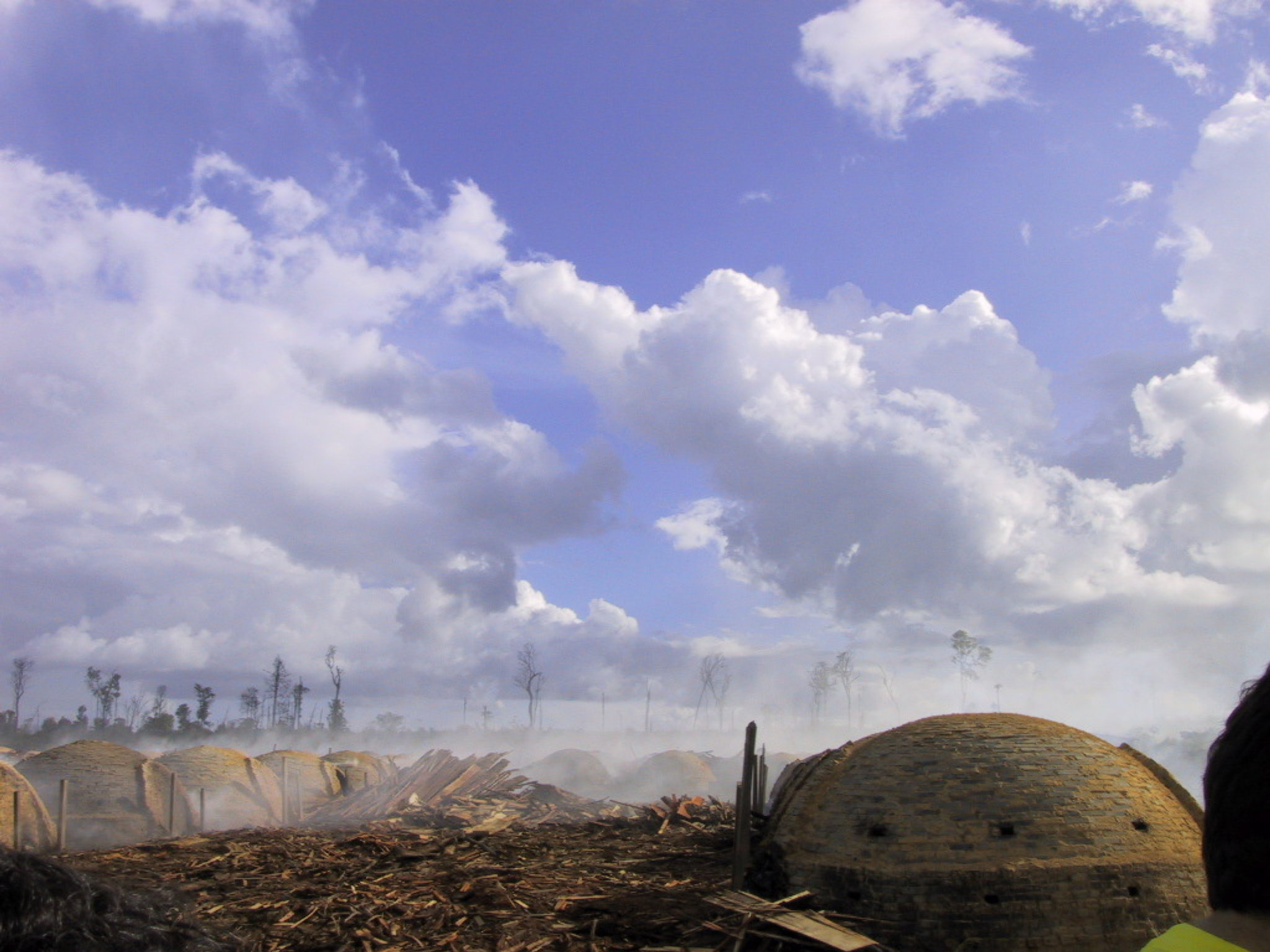 Holzkohlegewinnung im Regenwald - GNU-FDL - selbst fotografiert